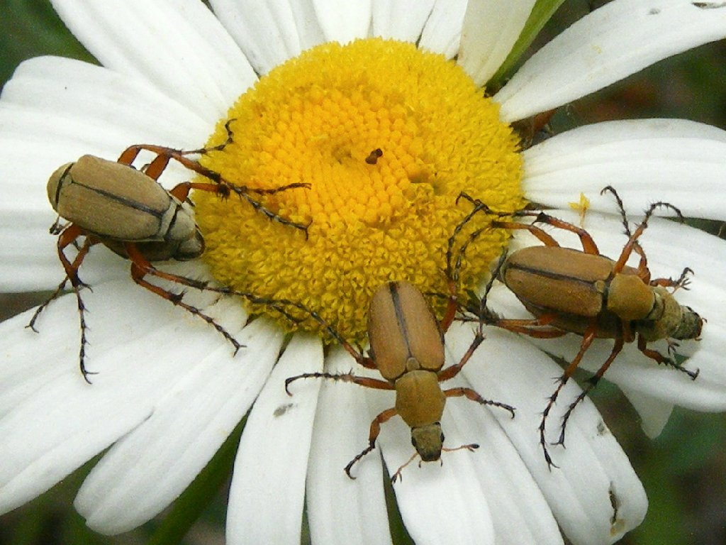 Macrodactylus subspinosus (Scarabée du rosier)